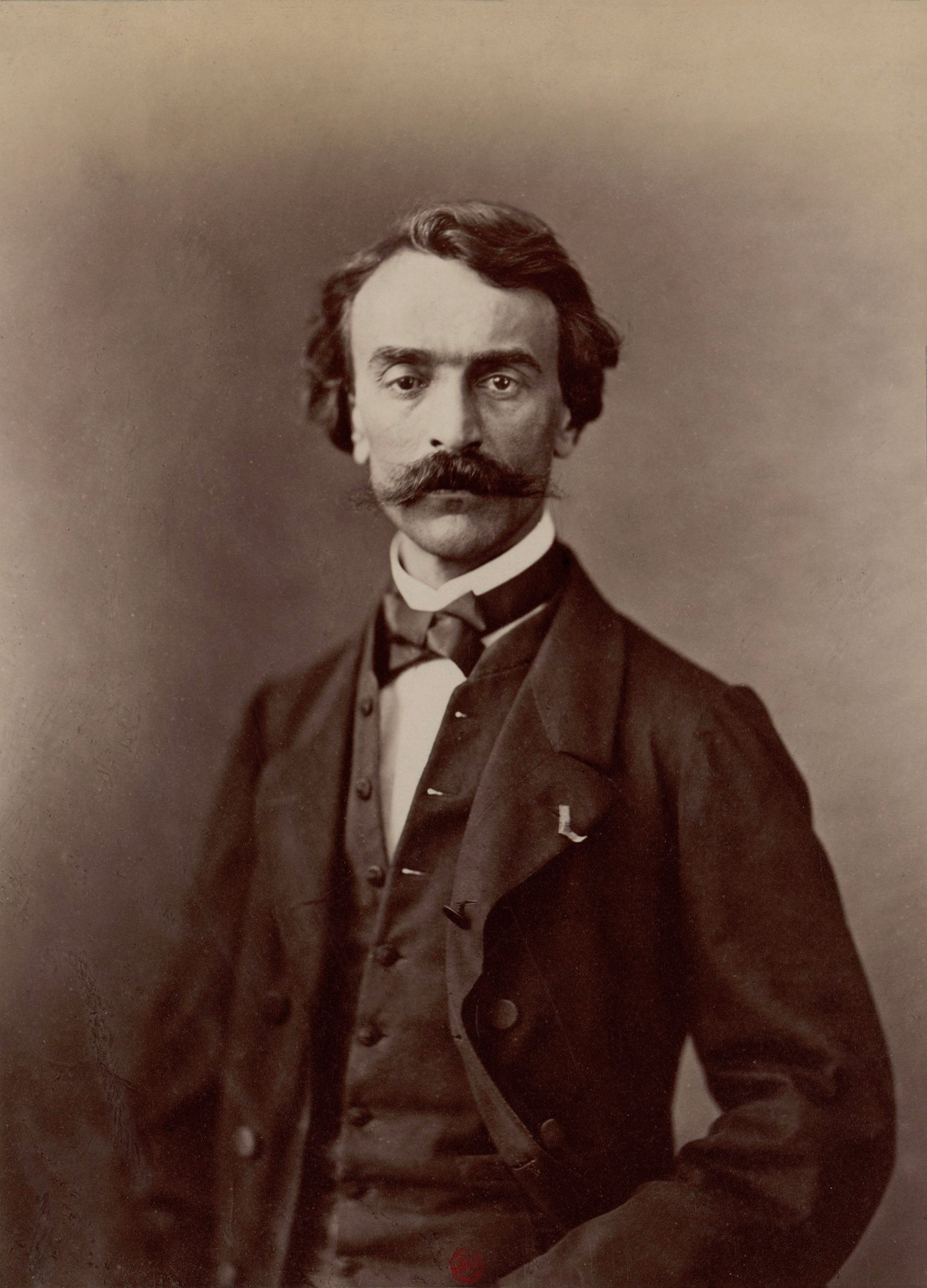 Jean-Léon Gérôme (1824-1904)